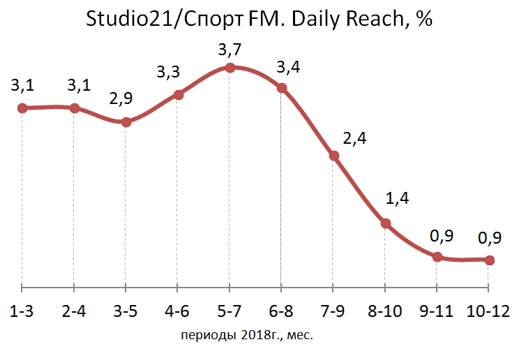 Рейтинг Studio21/Спорт FM в Москве за 2018г. Mediascope Radio Index в категории Reach Daily (%)